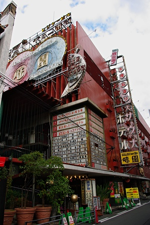 千日前味園ビル